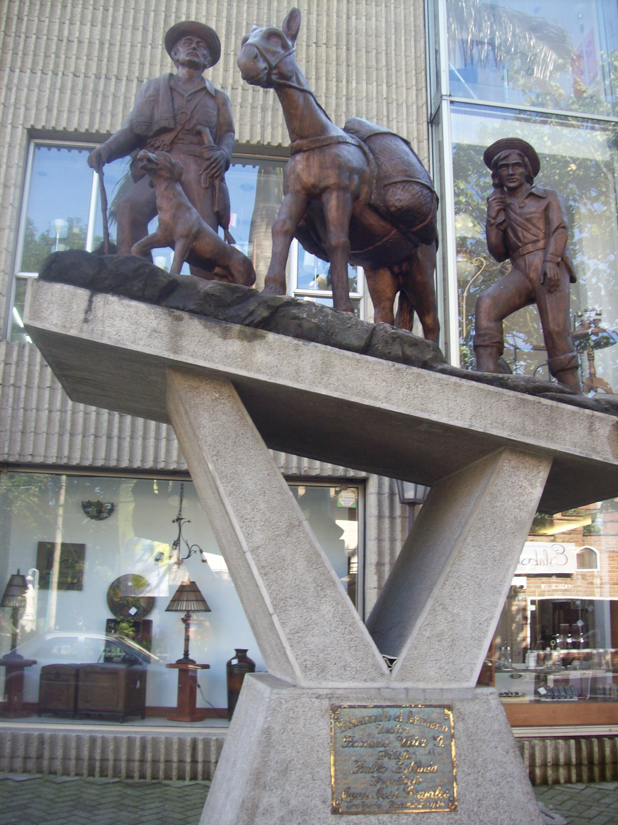 Monumento al Arriero en Envigado por Pablo Estrada (diciembre 11/1976)